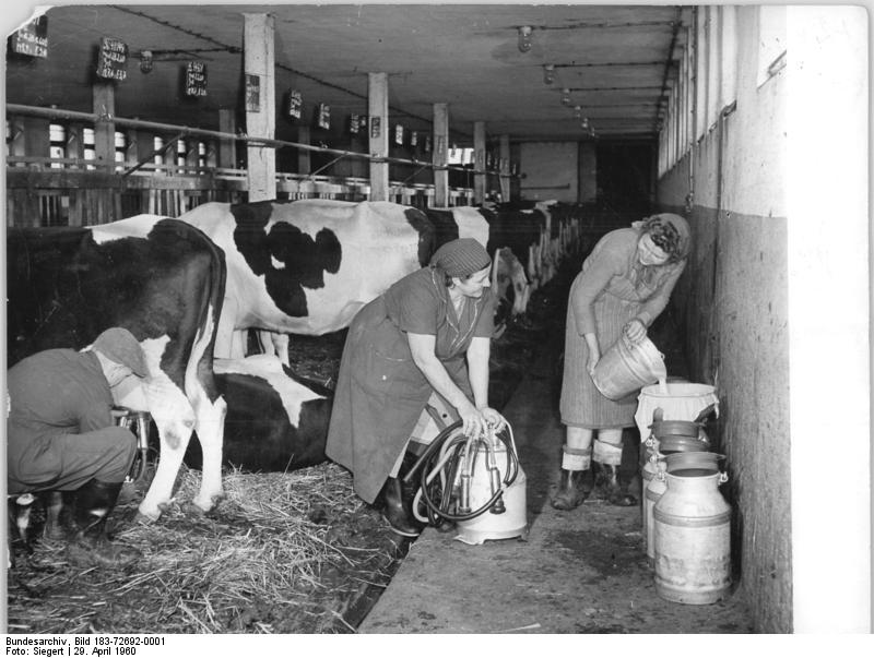 Großraschütz, Bauern beim Melken Zentralbild Siegert Ke 29.6.60 12.000 Liter Milch und 3000 kg Rind zusätzlich. Die Brigade des Rinderstalles der LPG Großraschütz, Kreis Großenhain, wird in diesem Jahr 12000 Liter Milch und 3000 kg Rind zusätzlich produzieren. Die Brigade, die aus dem Melkermeister Plaschke, seiner Frau und seiner Tochter besteht, betreut 64 Kühe. UBz: Melkermeister Plaschke mit seiner Frau und Tochter bei der Arbeit im Rinderstall.